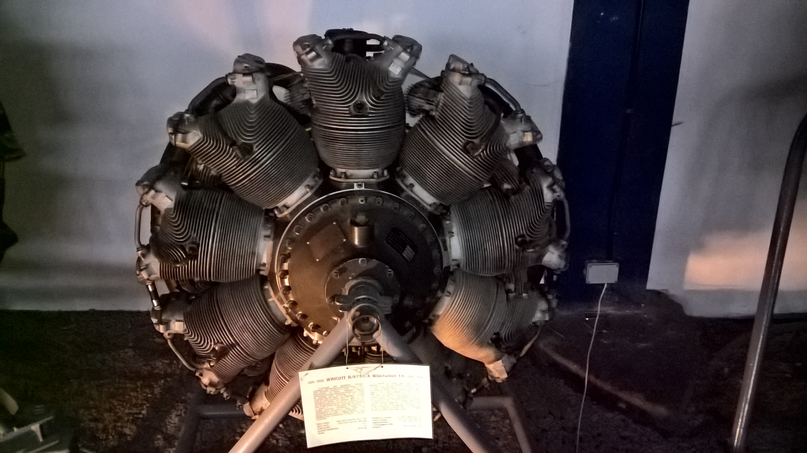 Amerykański 9-cylindrowy silnik gwiazdowy Wright Whirlwind R-975 z 1933 r. ze zbiorów Muzeum Lotnictwa Polskiego w Krakowie.